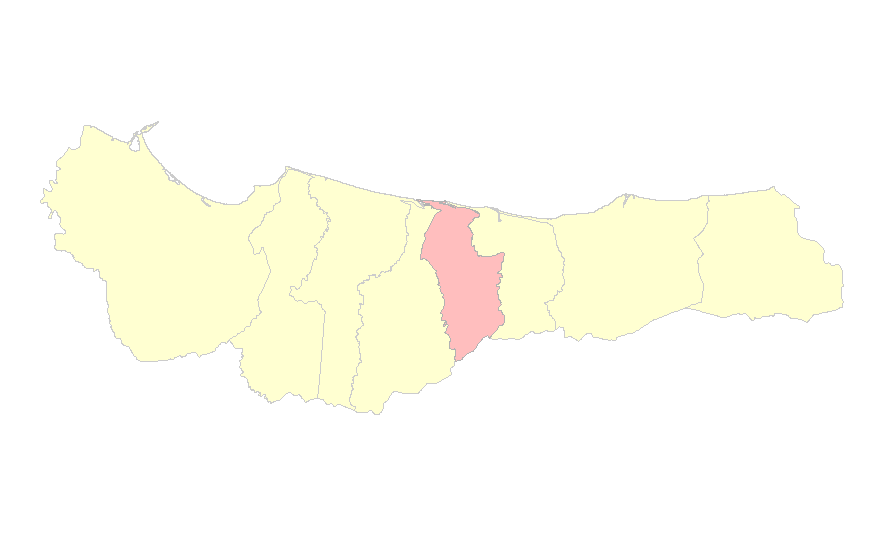 Położenie municipio San Francisco